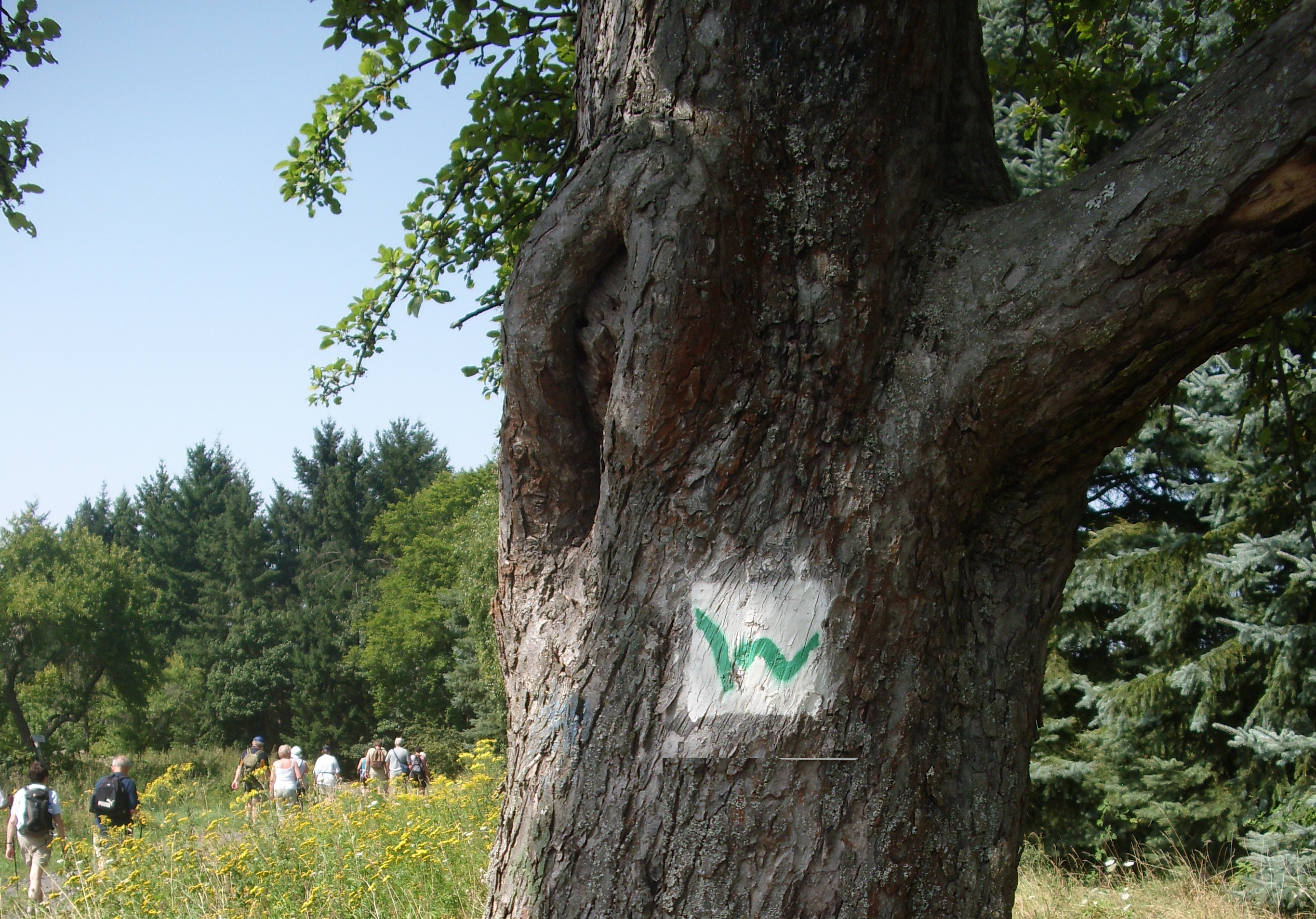 Wegwijzer langs de Westwald-Steig - Westerwald - Rijnland-Pfalz - Duitsland